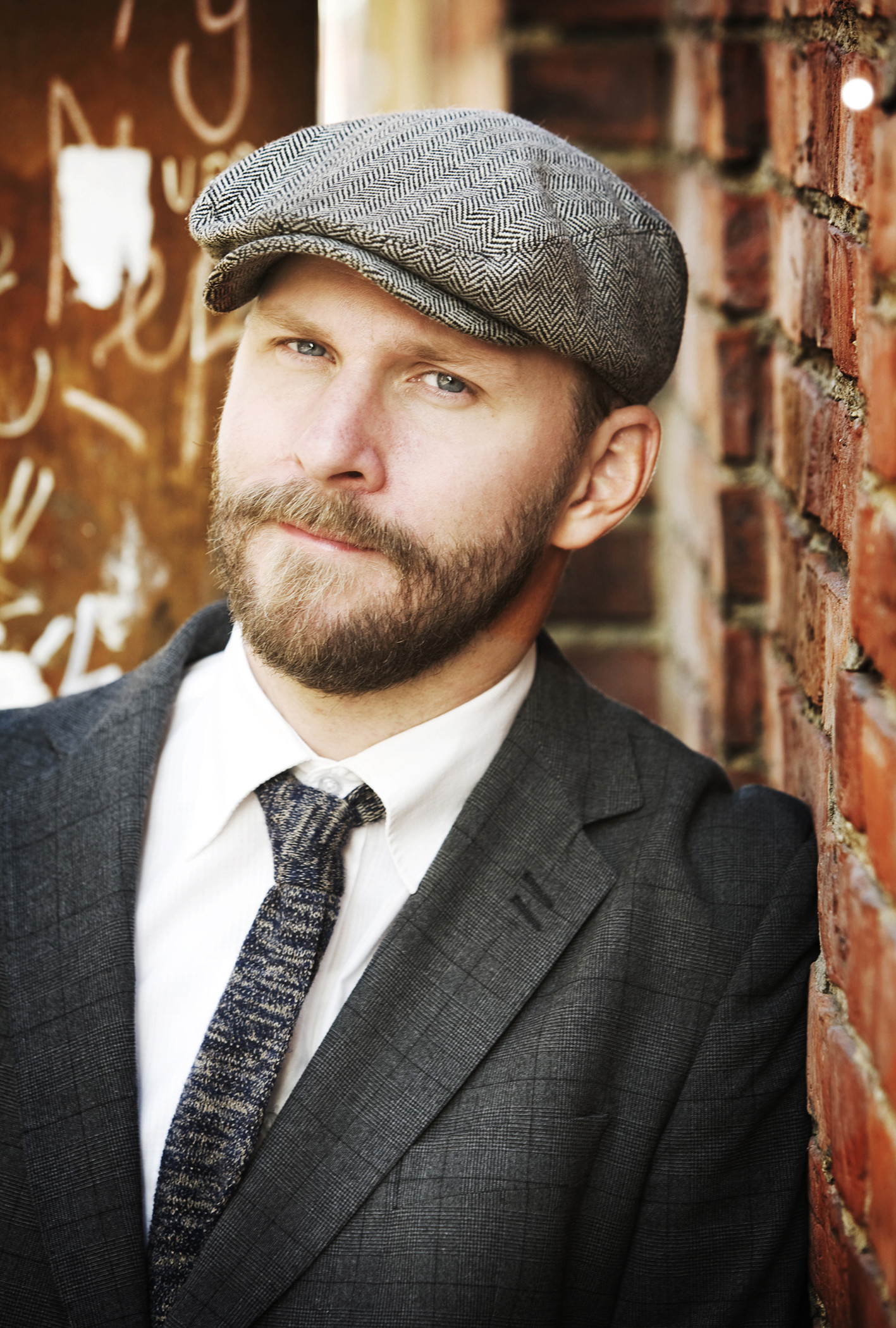 Pressbild på Kalle Lind.